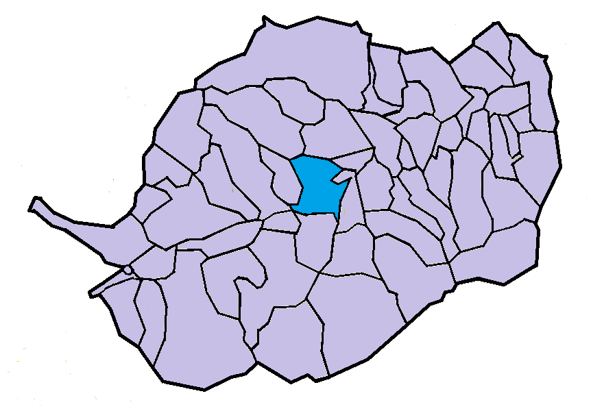 Serdinyà en el Conflent, a partir del mapa municipal del Conflent de lliure disposició adaptat al Nomenclàtor toponímic aprovat el 2007